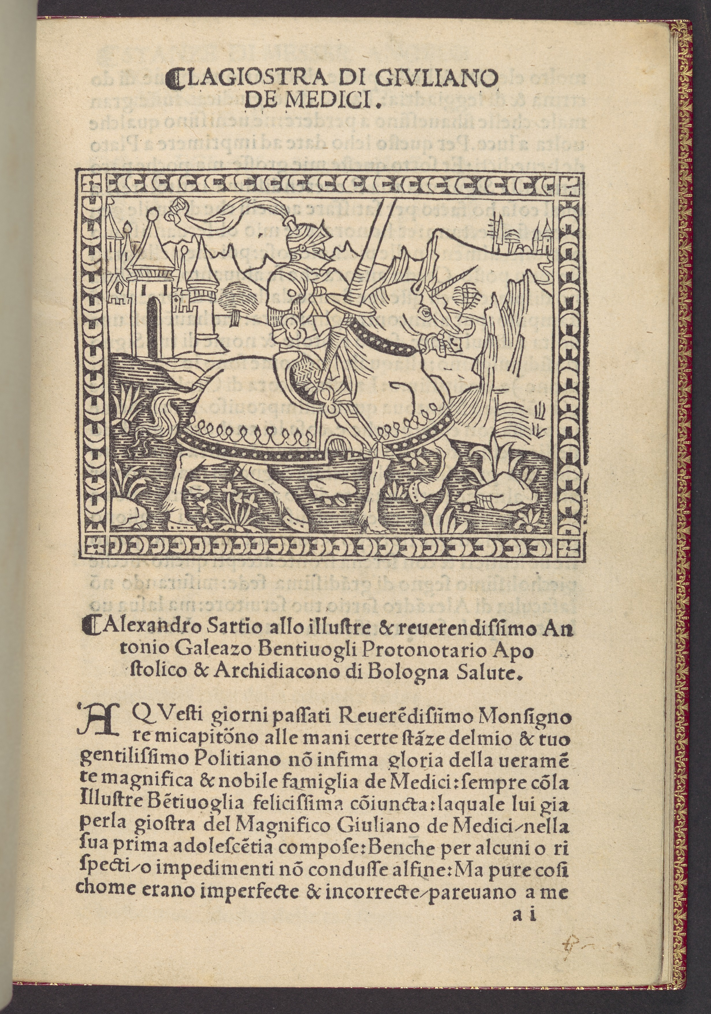 Book; Books